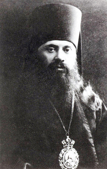 Настоятель Данилова монастыря (1906-1914) епископ Серпуховский Анастасий (Грибановский)